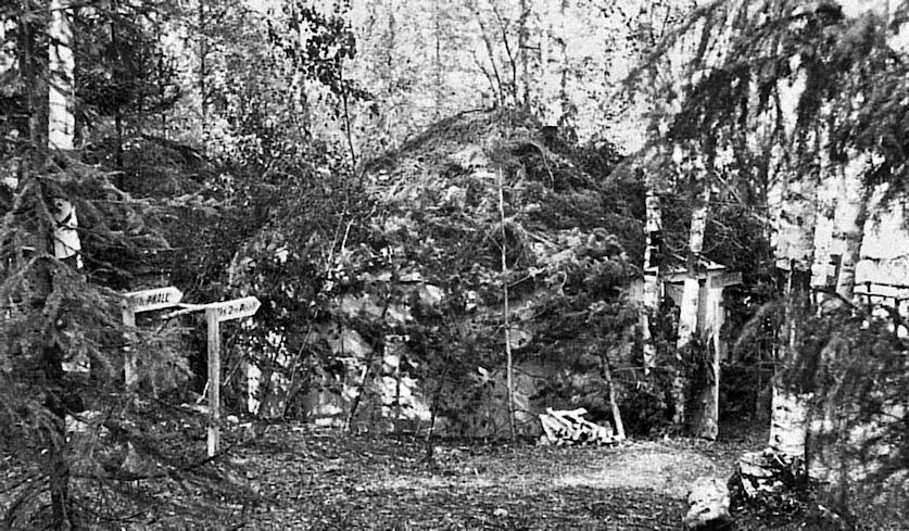 Pahvinen kuudennen armeijakunnan esikunta naamioituna Massilassa elokuussa 1941.